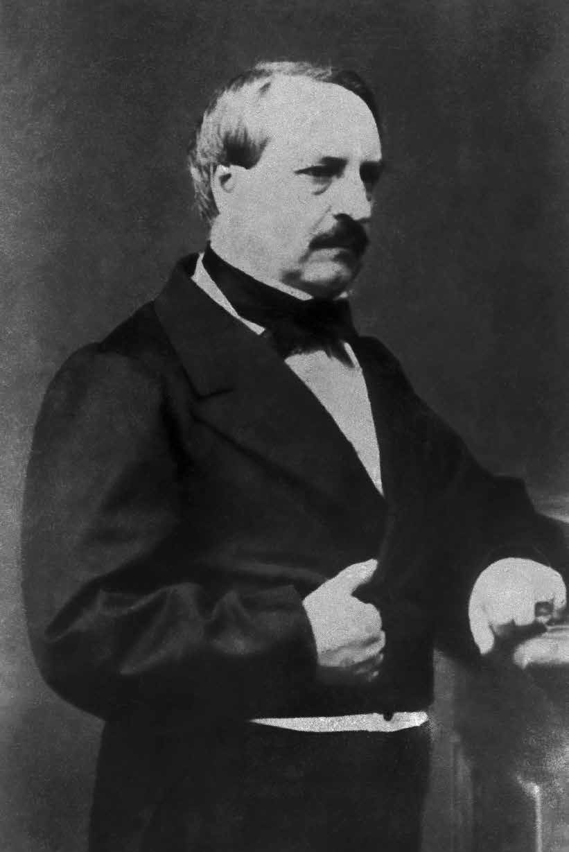 Luis La Puerta (1811-1896) militar y político peruano, que llegó a ser presidente provisorio por breves días y en dos ocasiones: en 1868 y en 1879.